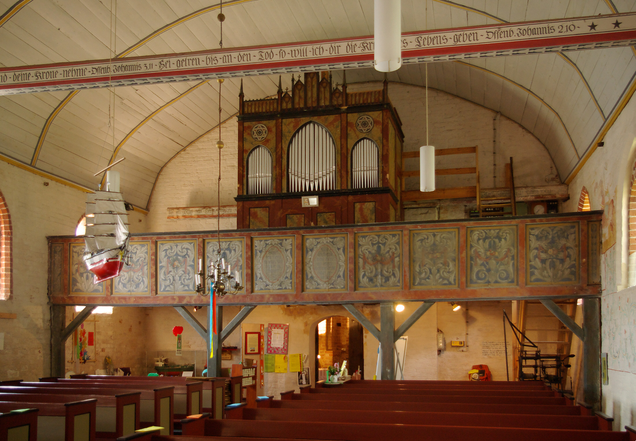 St. Nikolai-Kirche Altefähr, Rügen. Schiff mit Tonnendach und Orgelempore